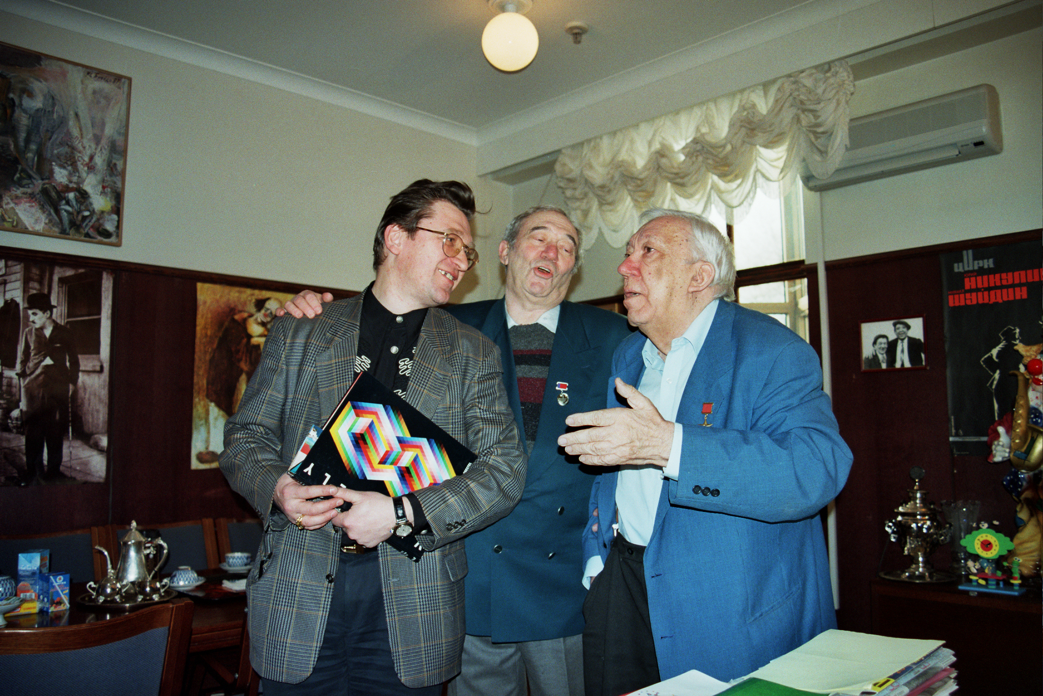 Иллюстрация из книги книги Анастасии Федоренко «Большая книга жизни. Юрий Никулин»